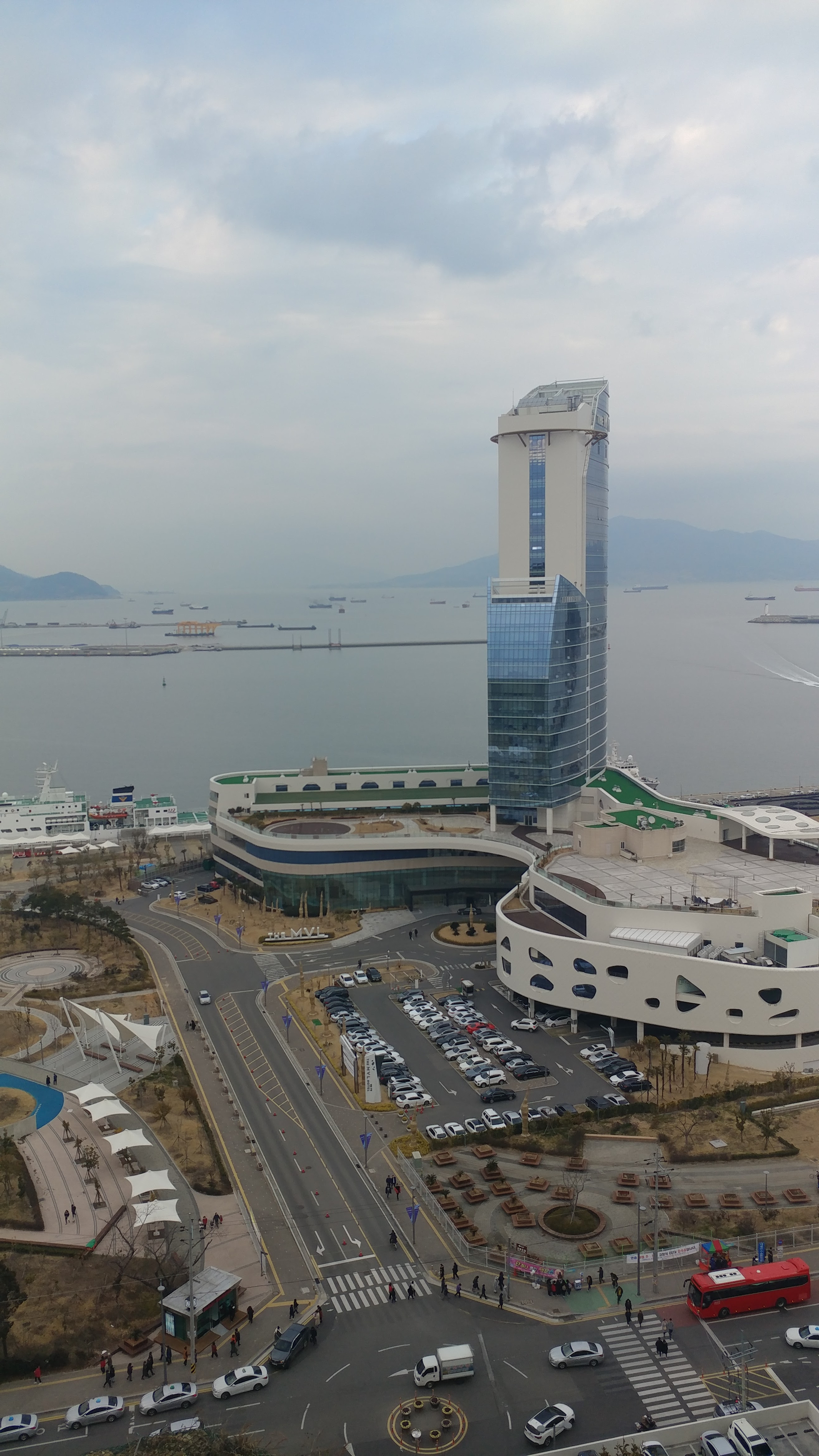 여수 MVL 호텔